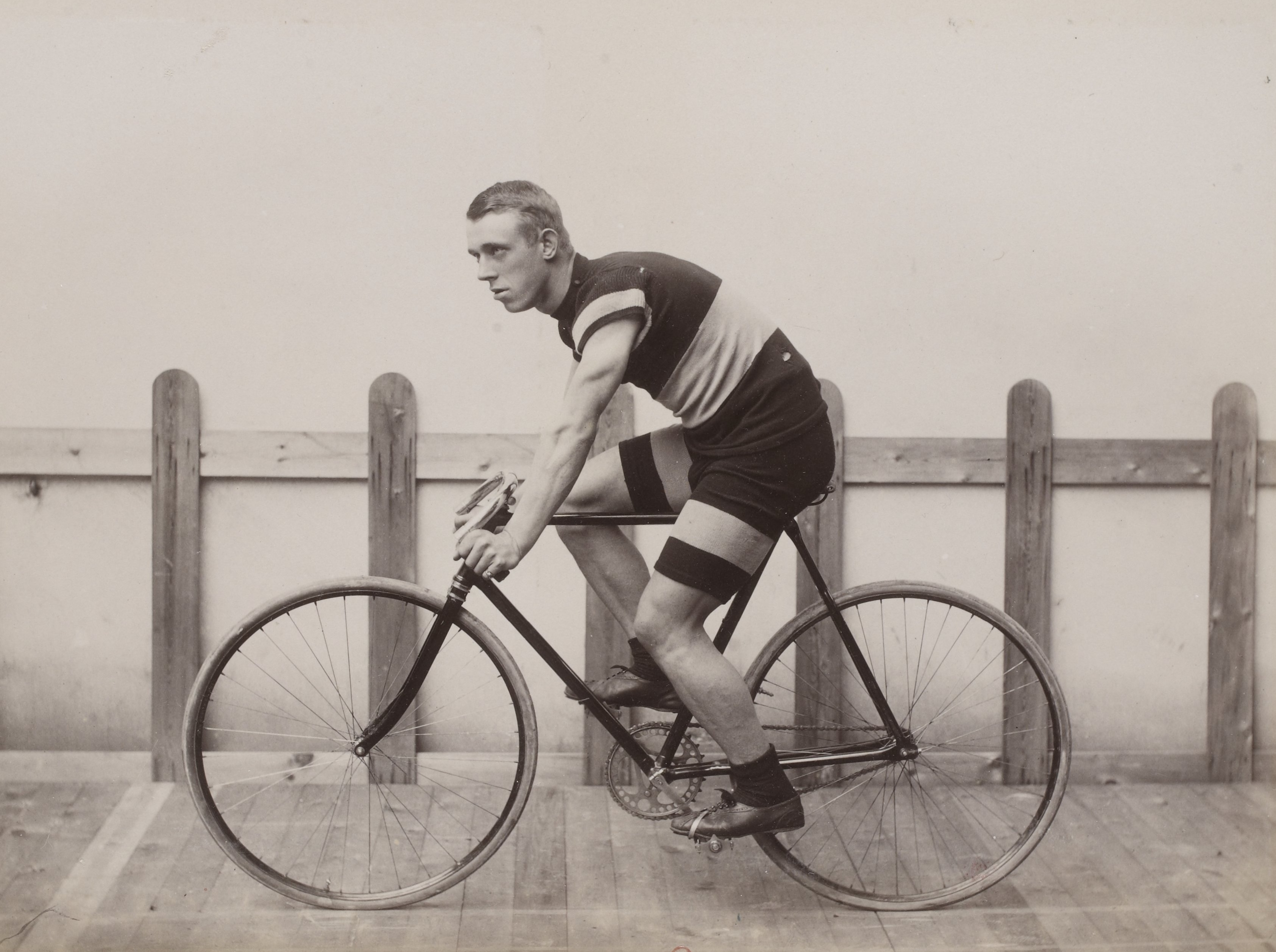 Collection Jules Beau. Photographie sportive : T. 5. Années 1897 et 1898 : Thomas Gascoyne.